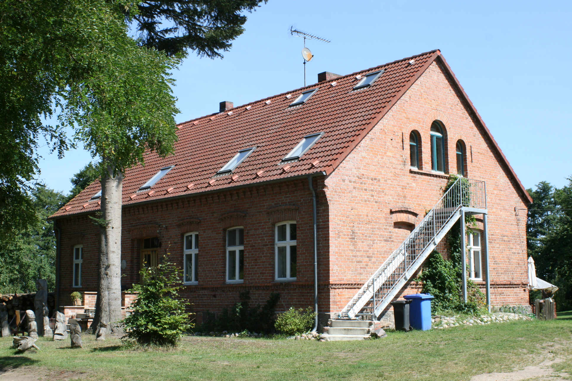 Ehemaliges Forsthaus auf dem Mirower Holm.